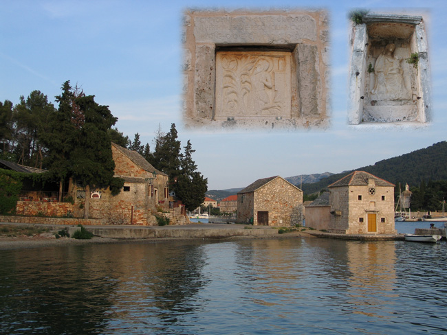 crkva sv. Jerolima s hospicijem, Stari Grad, island of Hvar